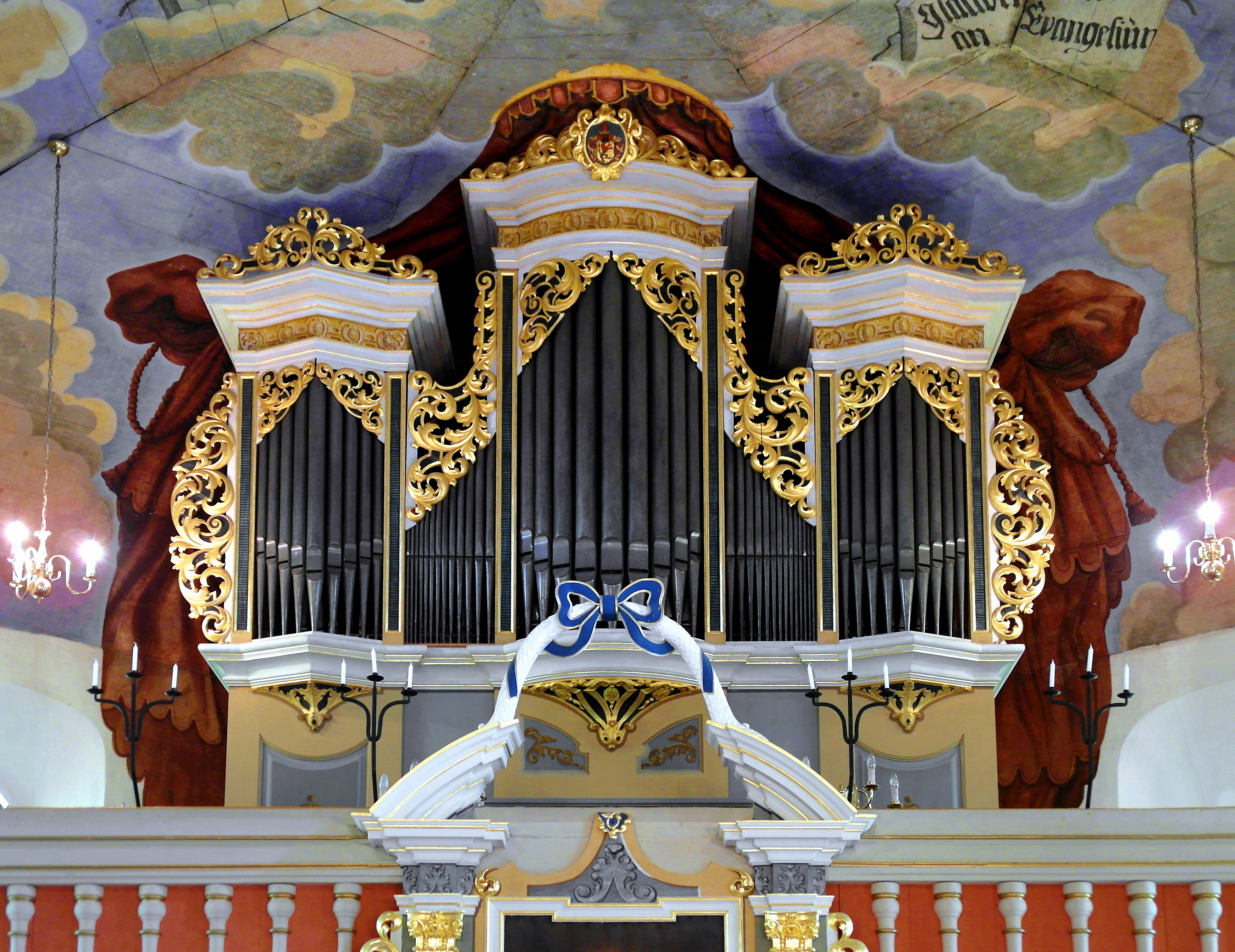 11.07.2018 09619 Helbigsdorf (Mulda): Evangelische Dorfkirche, Hauptstraße (GMP: 50.811503,13.365515). Spätgotik aus dem 14./15. Jahrhundert, 1576 und 1726 erweitert. Überwiegend barocke Ausstattung. Blick zur hinter dem Altar liegenden Orgelempore. Die Orgel hat Gottfried Silbermann in den Jahren 1726-1728 erschaffen. Sie zählt zu den kleinsten zweimanualigen Orgeln Silbermanns, besitzt 17 Register und 1008 Pfeifen. Bekrönt wird sie von einem kleinen Wappenschild mit einem aufrecht schreitenden rot-grünen Löwen, dem Zeichen der Familie von Schönberg. [SAM6734.JPG]20180711345DR.JPG(c)Blobelt